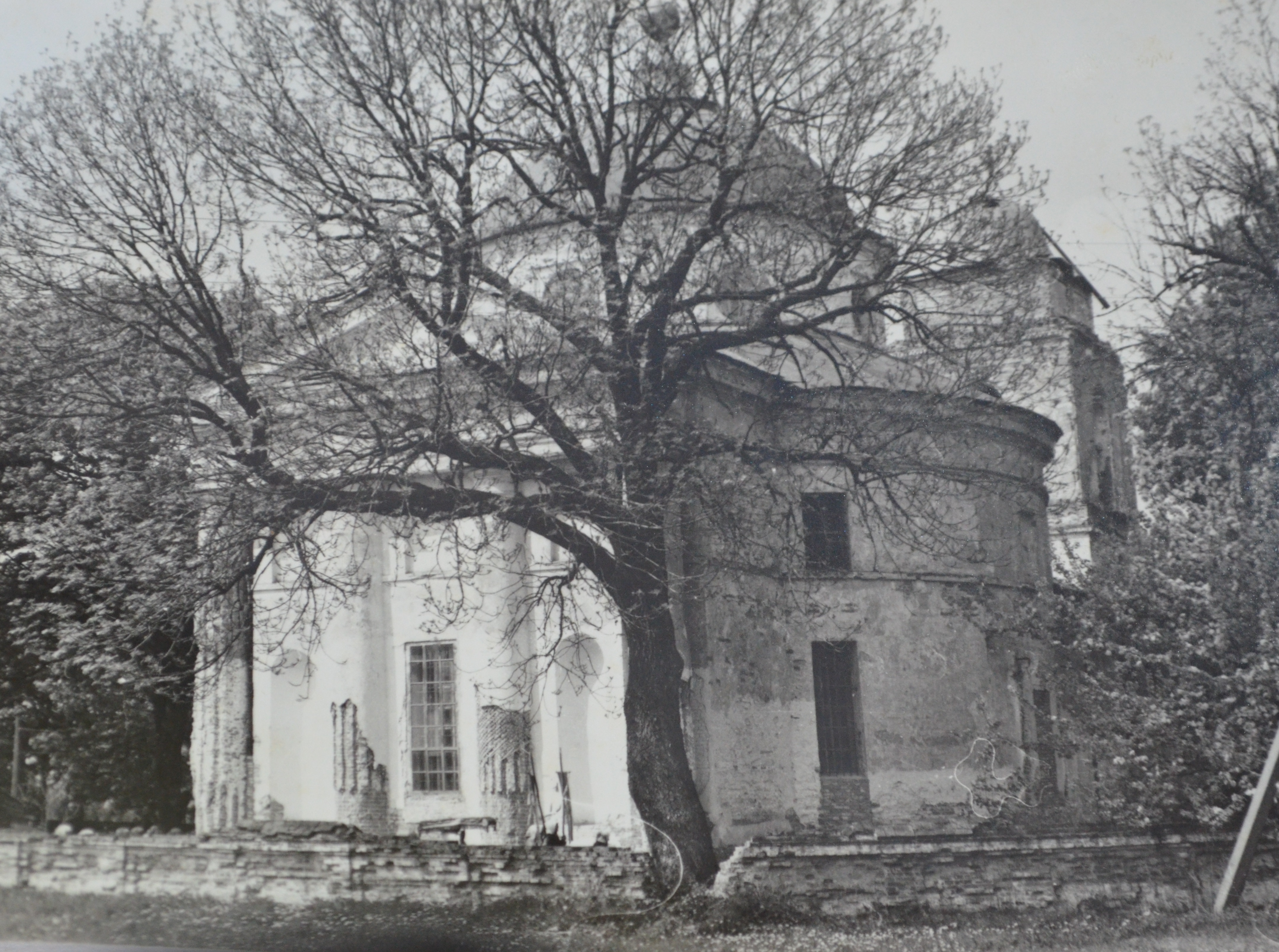 Церковь Иоанна Война, с. Куяновка, 91 год